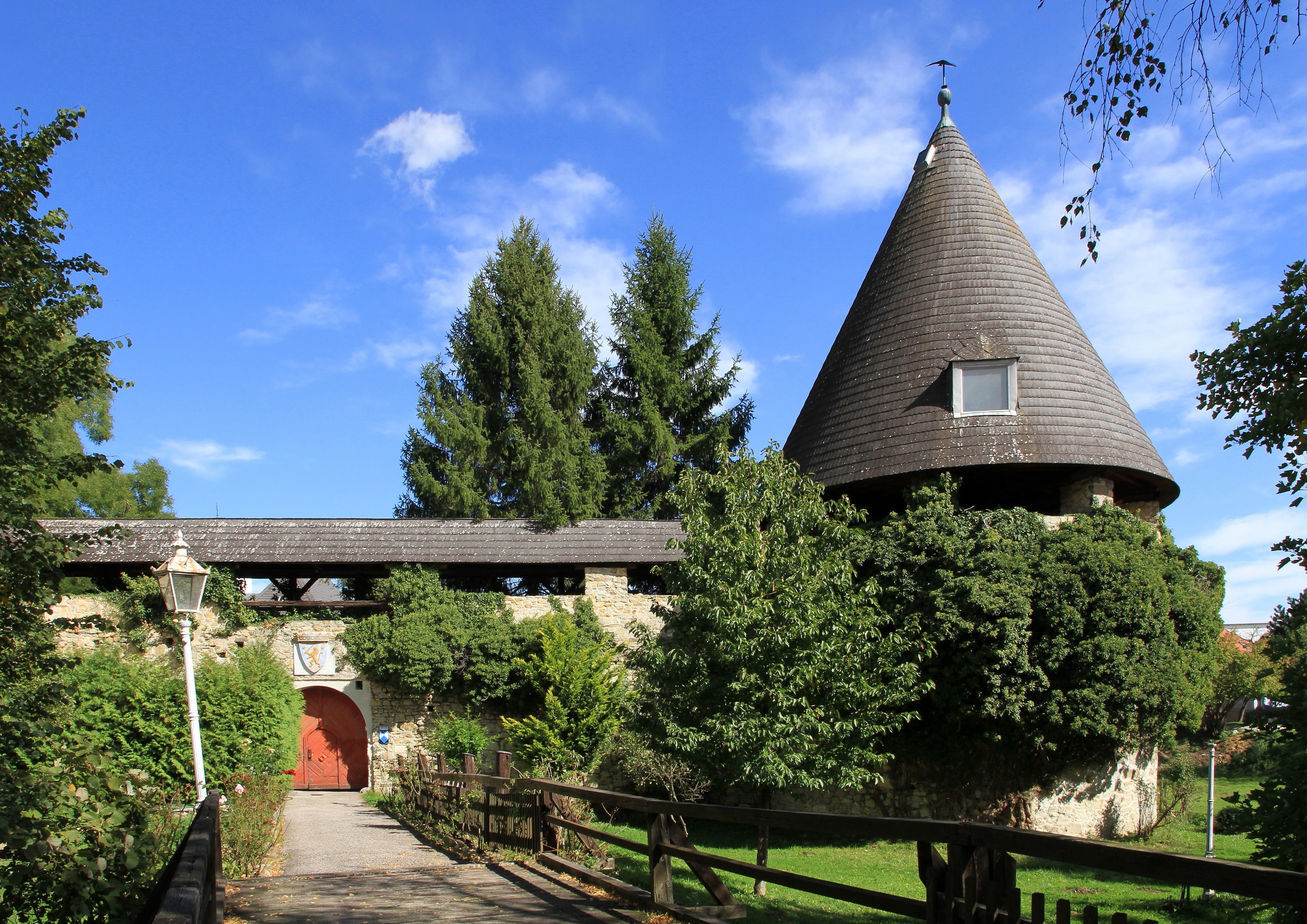 Südportal des Schlosses Kobersdorf. Eine mächtige Anlage, die ehemals von einem Wassergraben eingeschlossen war und urkundlich 1229 erwähnt wurde.